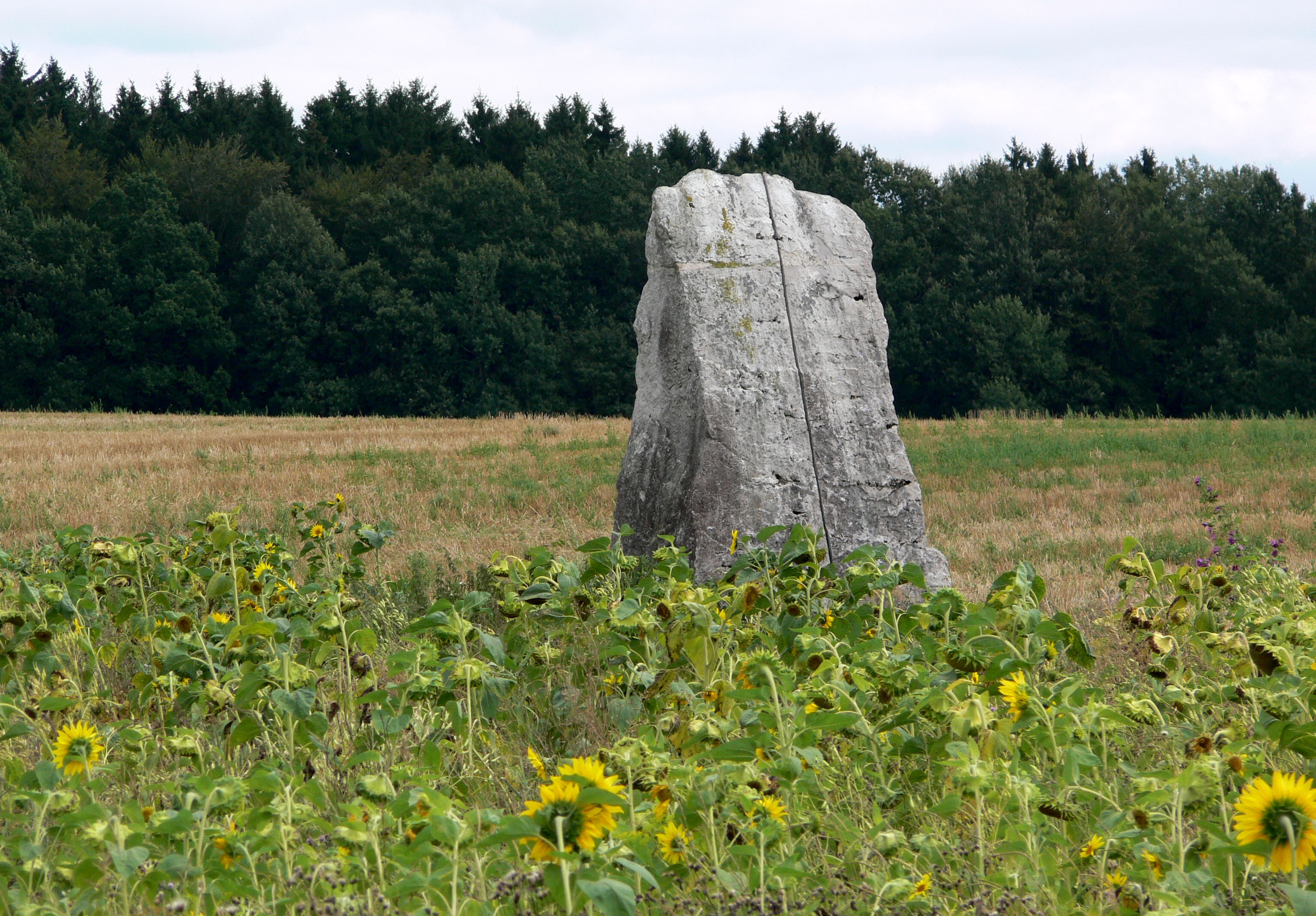 Skulpturenfeld Oggelshausen, Landkreis Biberach Europäisches Bildhauersymposium 2000 Marit Lyckander, Norwegen: Ganz innen VI – Helt i VI